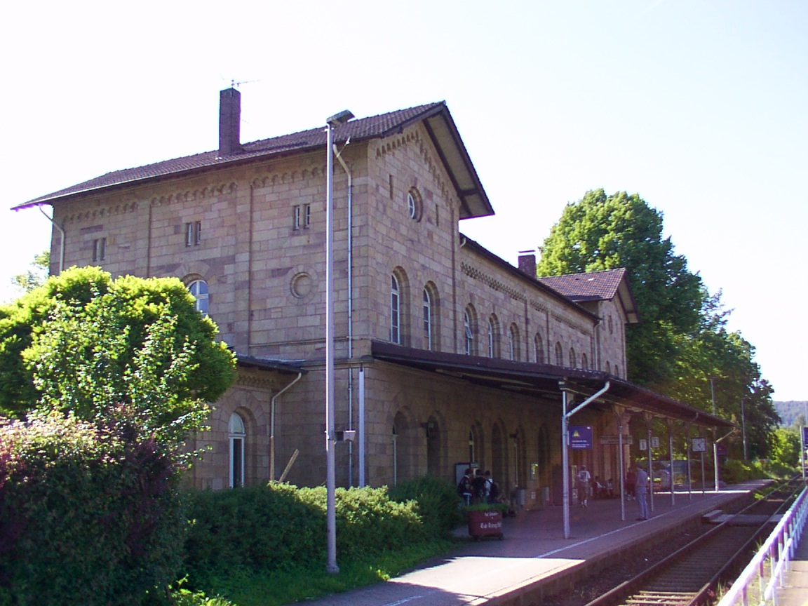 Bahnhof Bad Driburg This is the photograph of an architectural monument. It is part of the list of cultural monuments of Bad Driburg, no. A 51